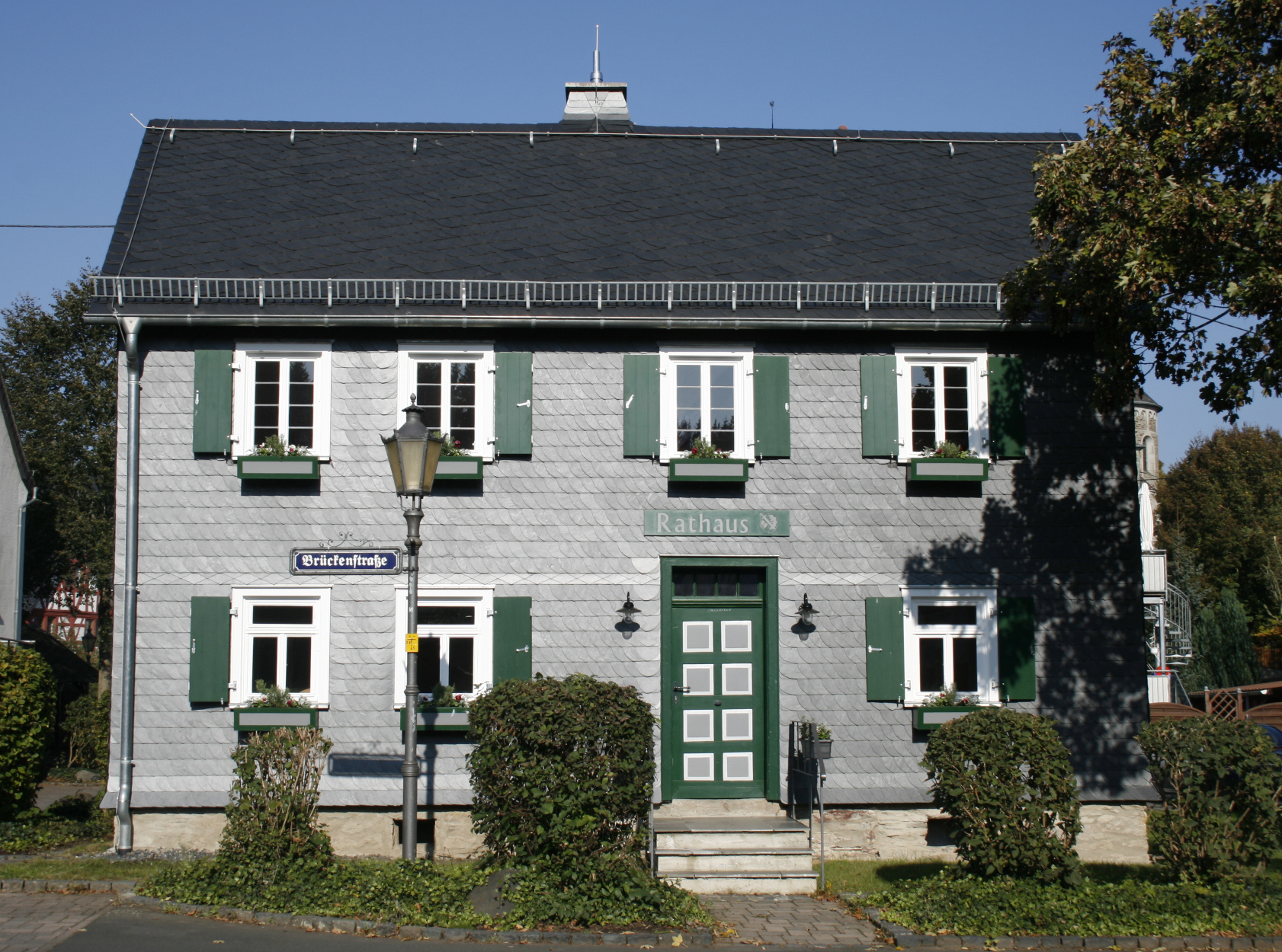 Rathaus der Gemeinde Niedererbach (Westerwaldkreis)